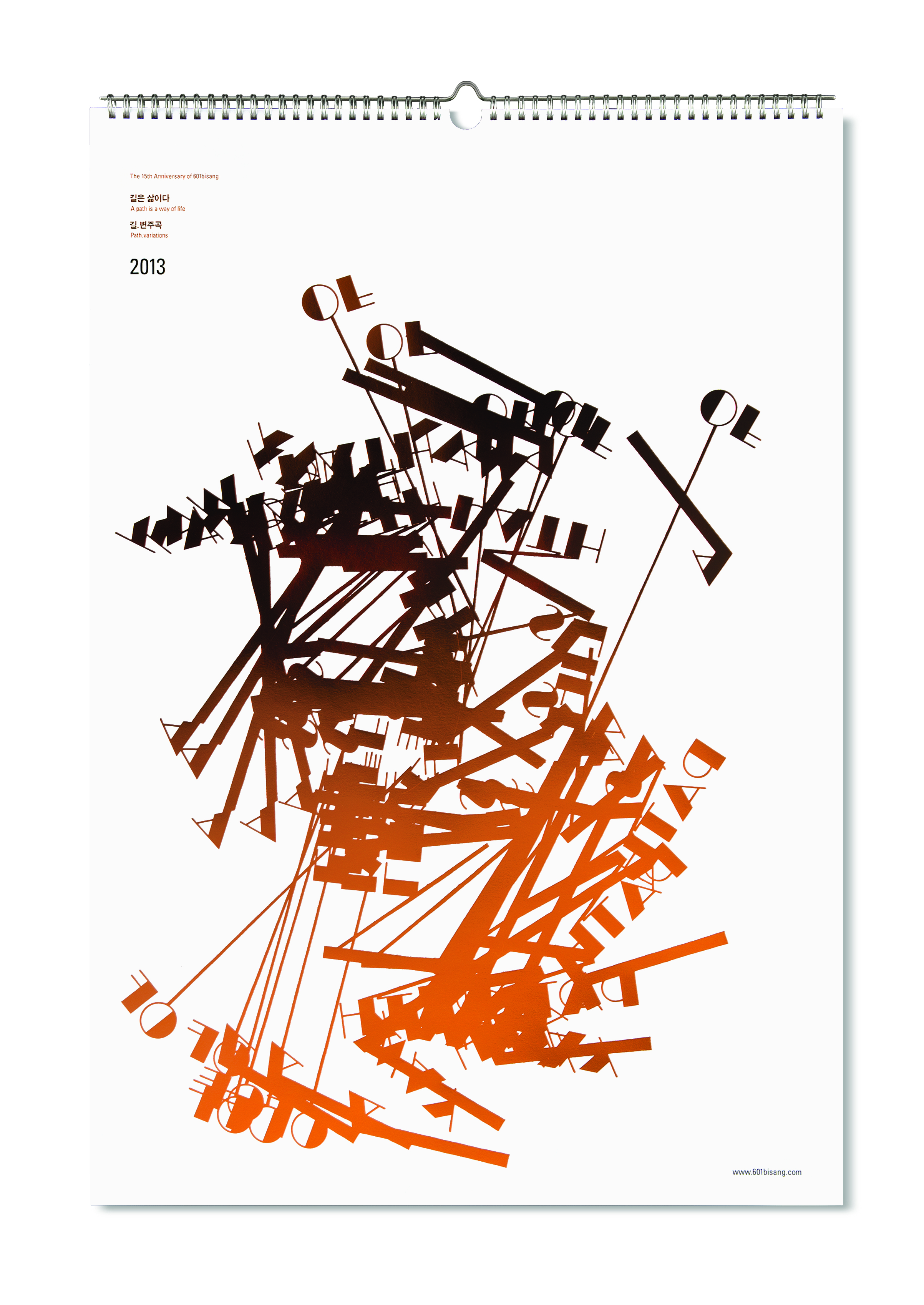 길 변주곡